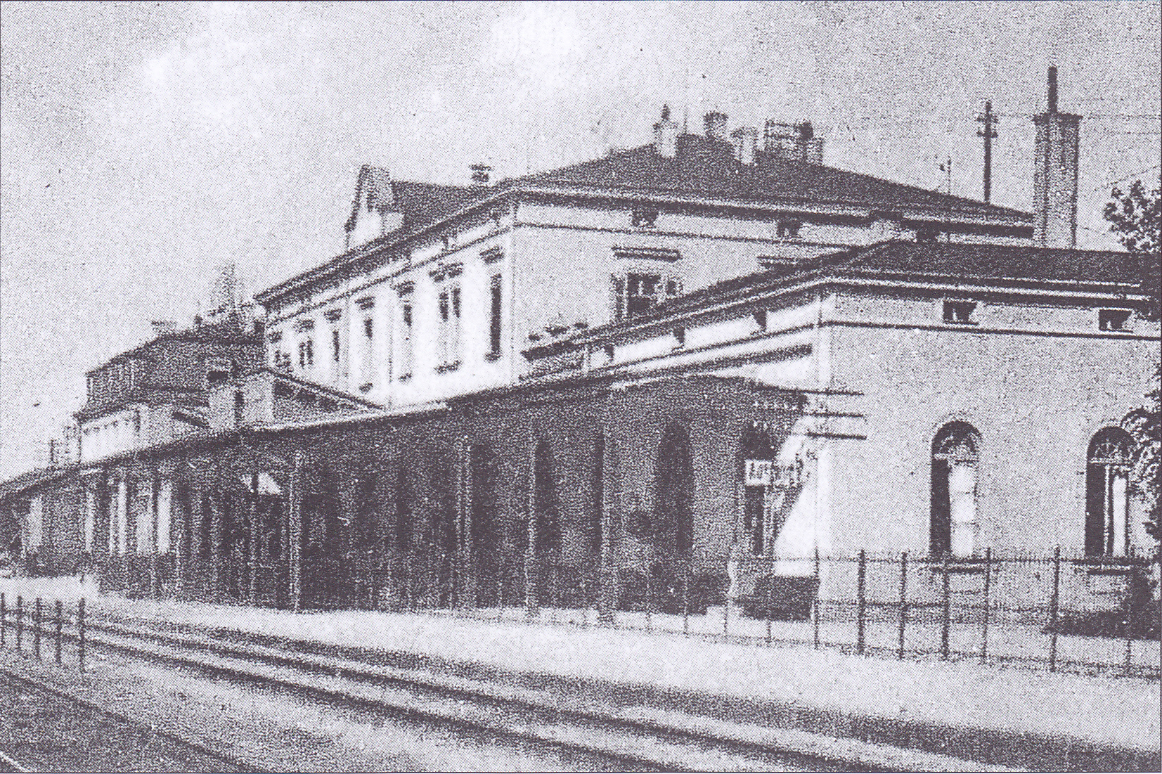 Zweites Empfangsgebäude des Bahnhofs Buchloe von der Gleisseite, historische Postkarte